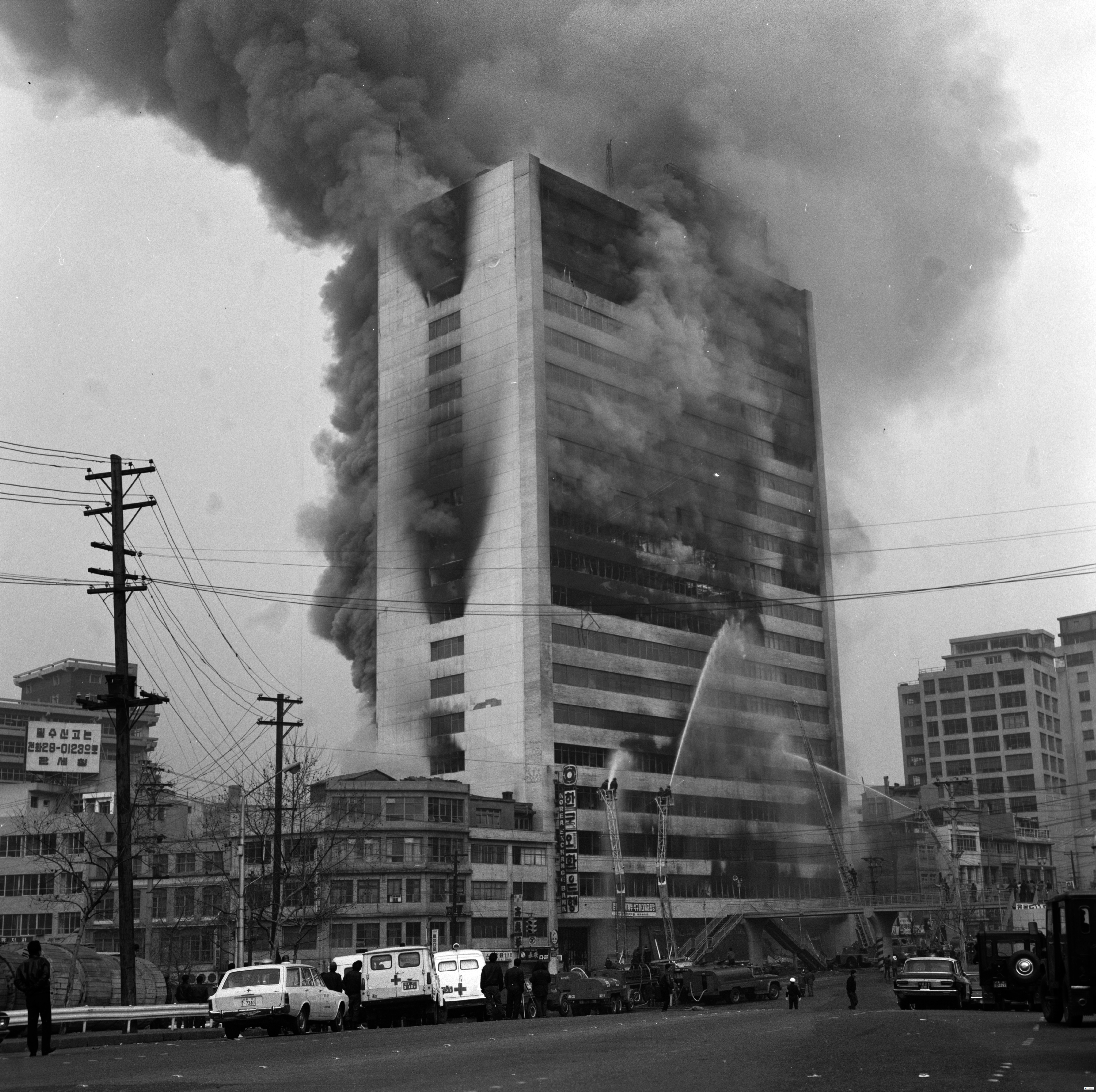 서울특별시 소방재난본부 소장 사진. photos of Seoul Metropolitan Fire & Disaster Headquarters. 이 파일은 크리에이티브 커먼즈 저작자표시-동일조건변경허락 4.0 국제 라이선스로 배포됩니다. 단 누구인지 구별 가능한 특정 인물이 사진에 포함되어 있을 경우 사용 전에 서울특별시 소방재난본부 및 해당 인물의 승인을 받으셔야합니다. 감사합니다. evidence of permission